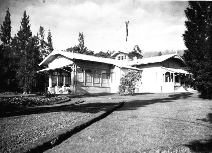 Foto. Herinneringen uit Sindanglaja aangeboden door De Vereeniging "Poerwa Tani". Het landhuis van de Gouverneur Generaal in Tjipanas